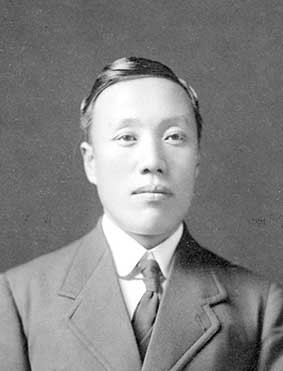 전덕기 목사